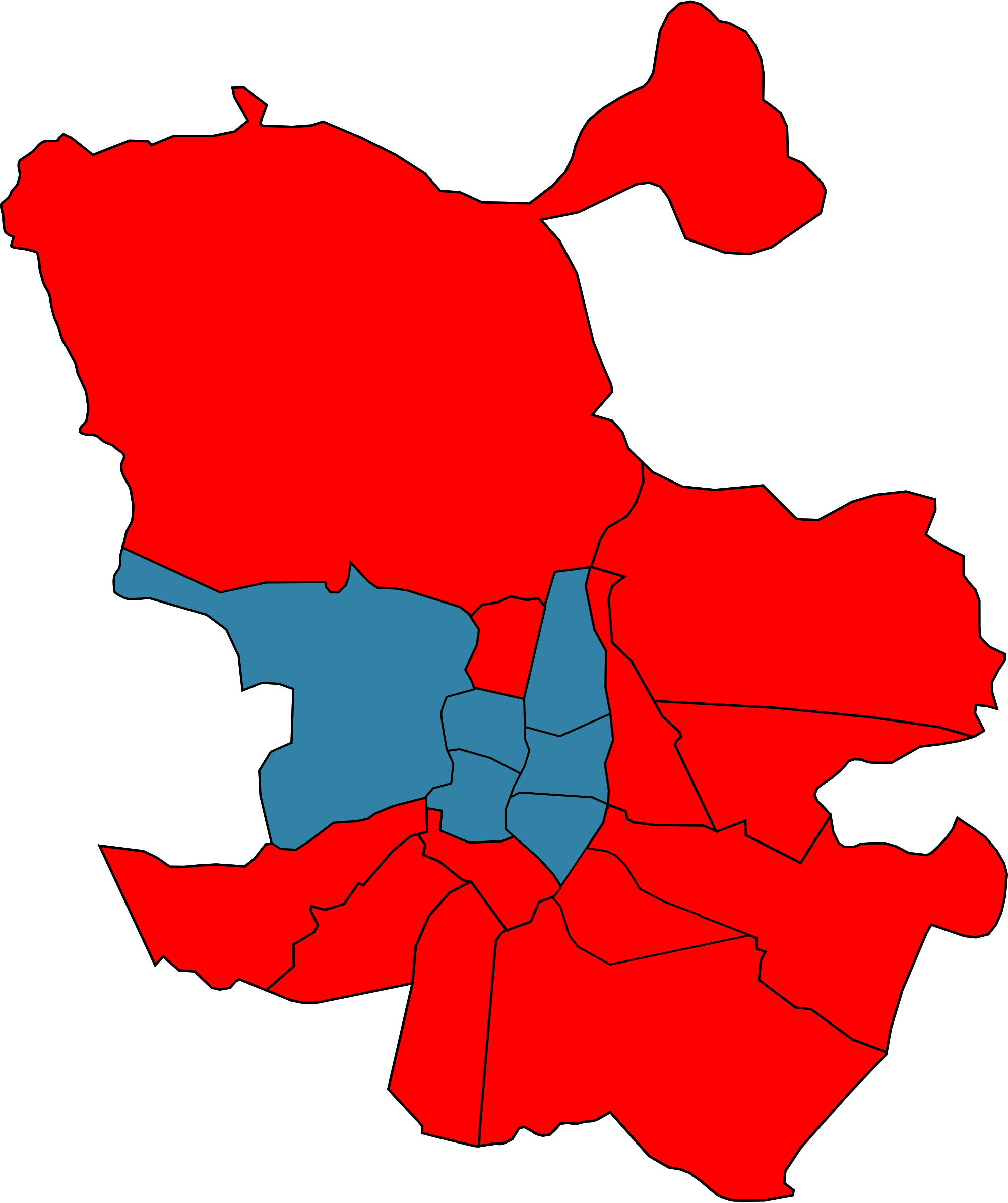 Lista más votada en cada uno de los 18 (entonces) distritos de Madrid en las elecciones municipales de 1983. Partido Socialista Obrero Español AP-PDP-UL Fernández Sanz, Fernando (1987). "La votación por distritos". Villa de Madrid. Informativo quincenal (110): 20-21. Madrid: Ayuntamiento de Madrid. ISSN 9968-2133.